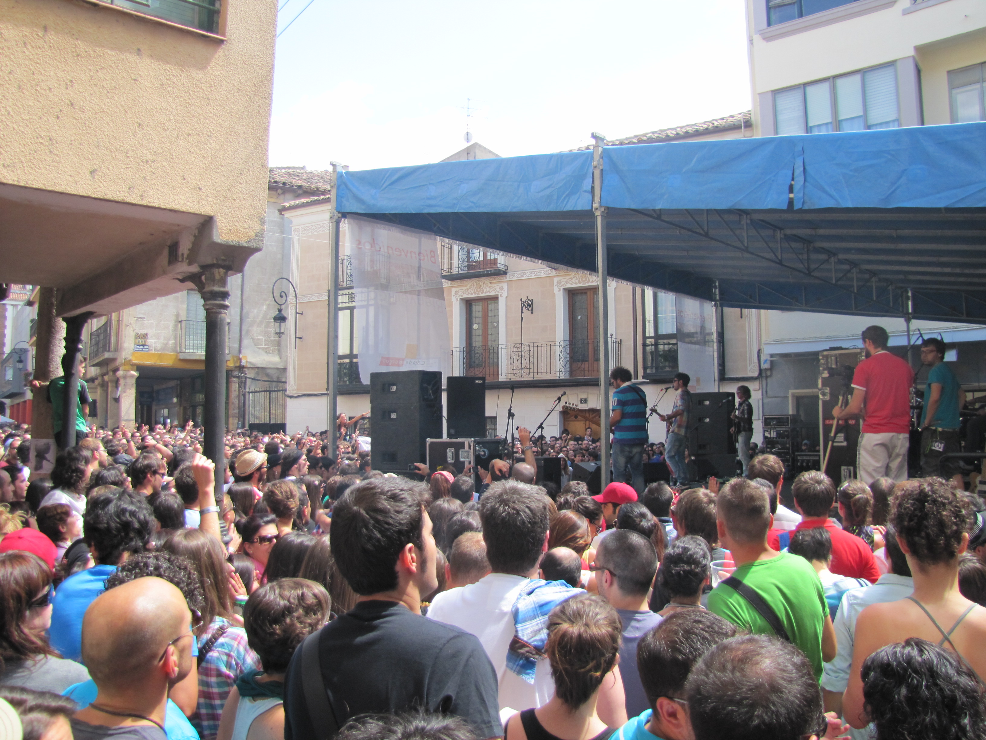 Supersubmarina durante su actuación en el Festival Sonorama 2010, en Aranda de Duero (Burgos), España. En el escenario de la Plaza del Trigo.